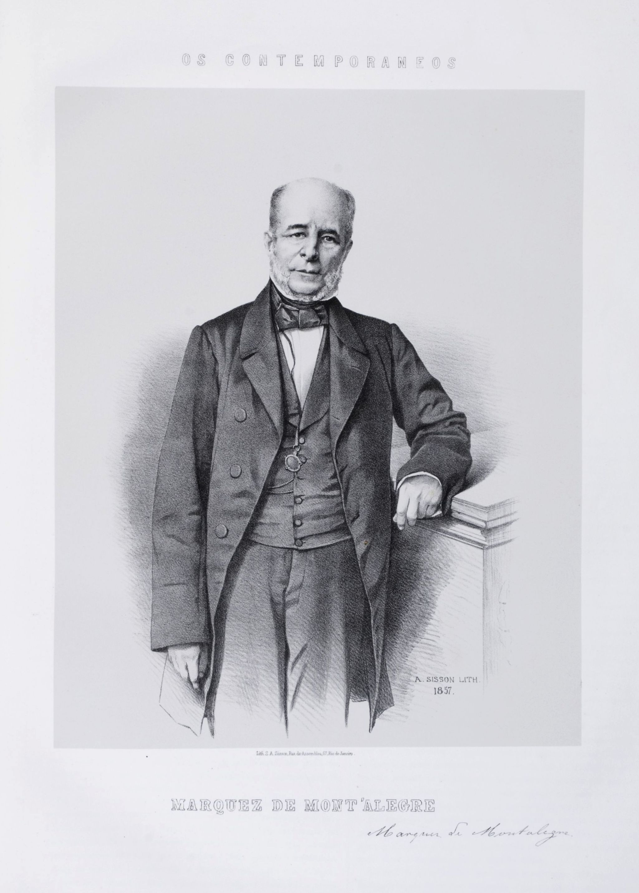 Litografia em preto e branco